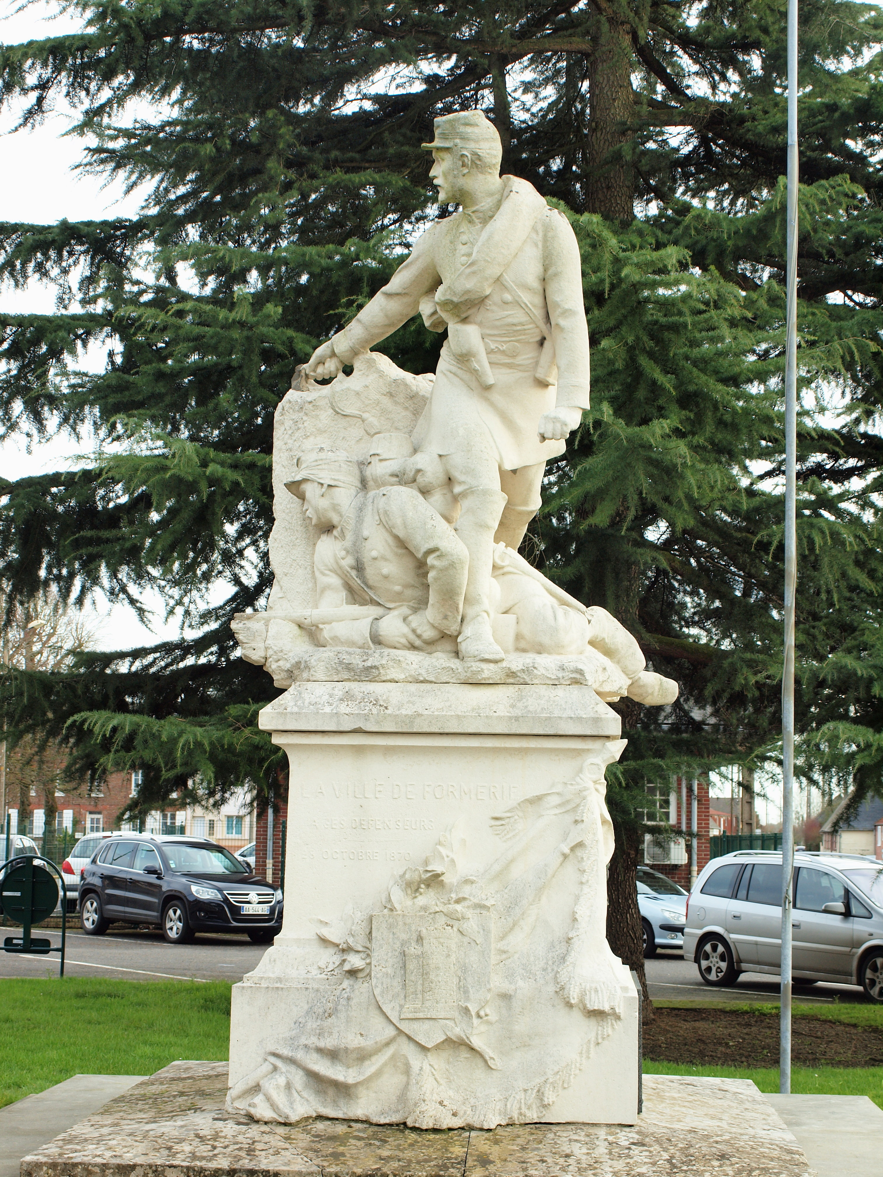 Formerie (Oise, France)